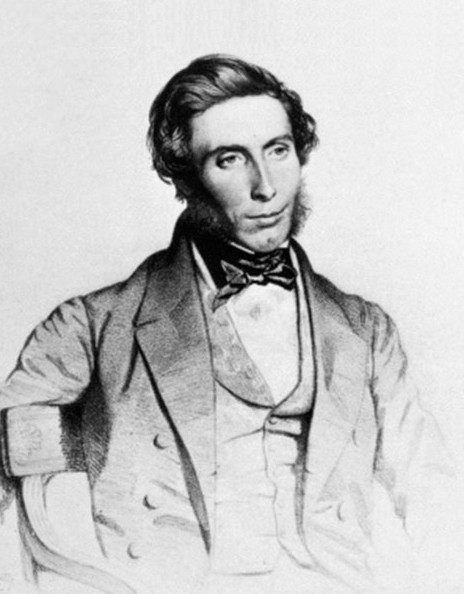 Sir William Robert Wills Wilde MD, FRCSI, (March 1815 – 19 April 1876)